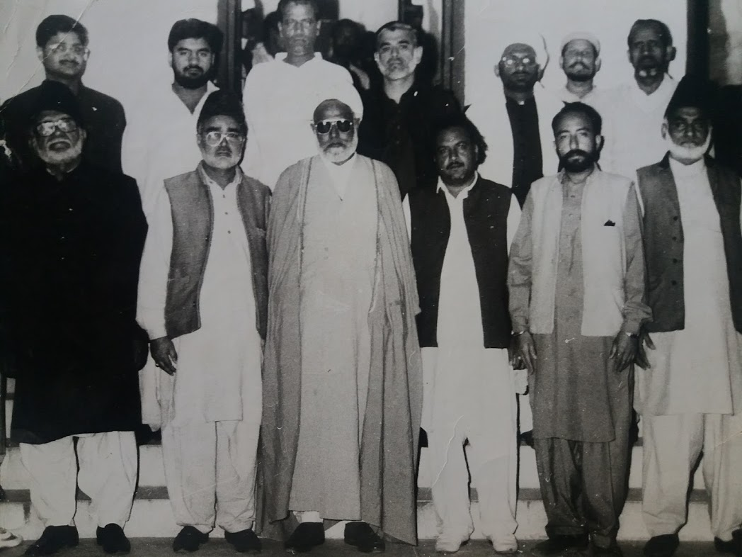 علامہ کاظم حسین اثیر جاڑوی مذہبی جرائد و اخباروں کے ایڈیٹرز کے ہمراہ